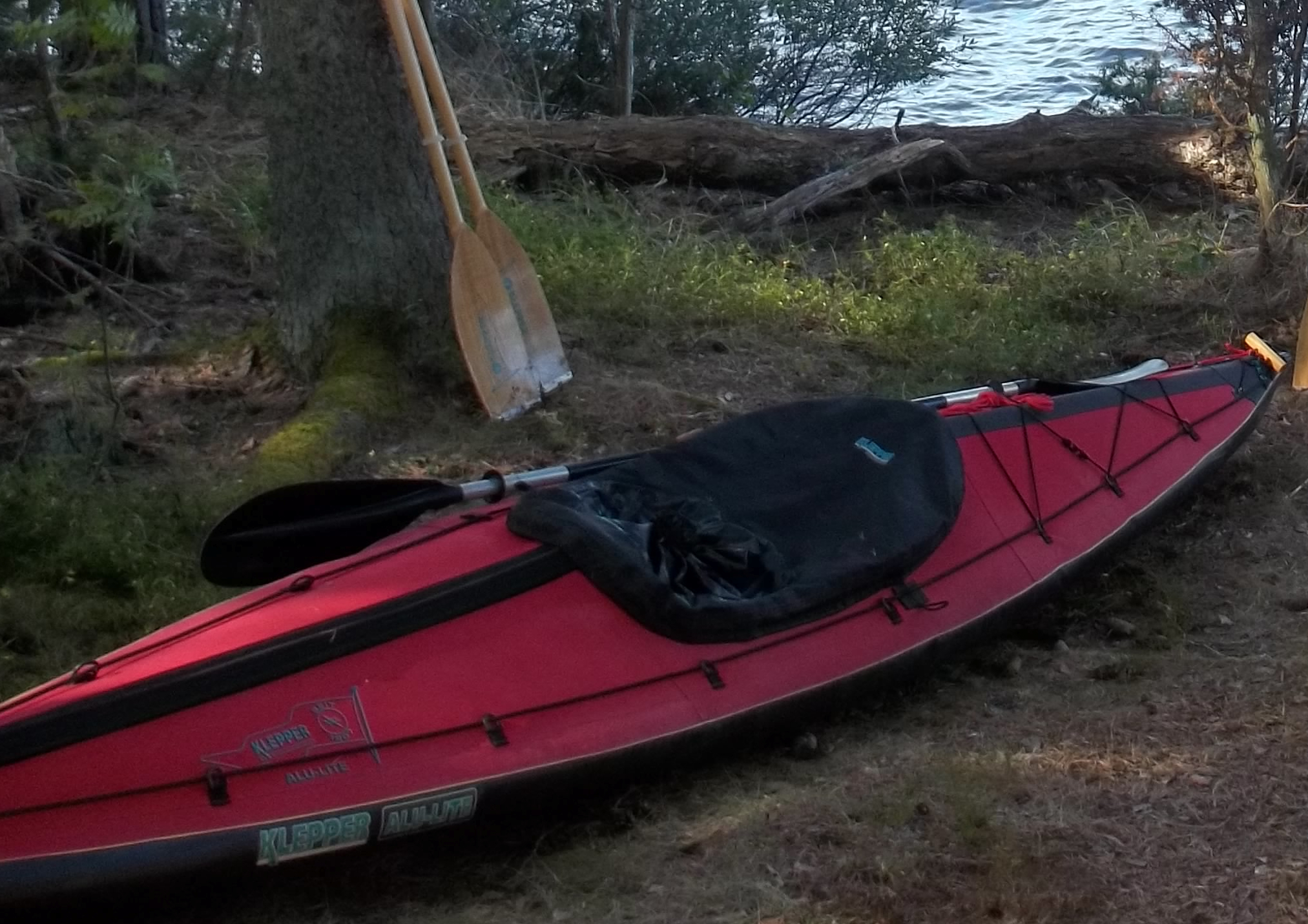 Klepper Alu-Lite 400 von 2006; Länge: 4 m, Breite: 0,7 m, Gewicht: 18 kg, Aufbauzeit ca. 15 Min.